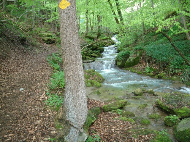 Muehlethurnen (Guerbetal)